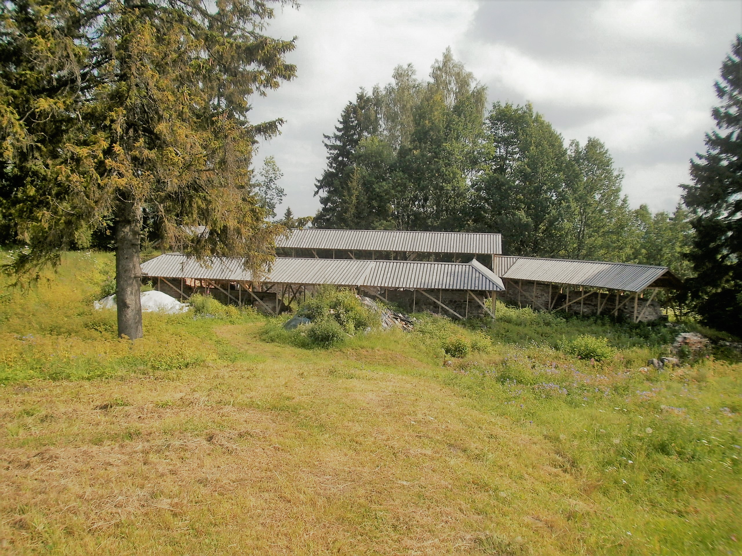 Vaade lõunasuunast linnusekiriku vundamentidele.